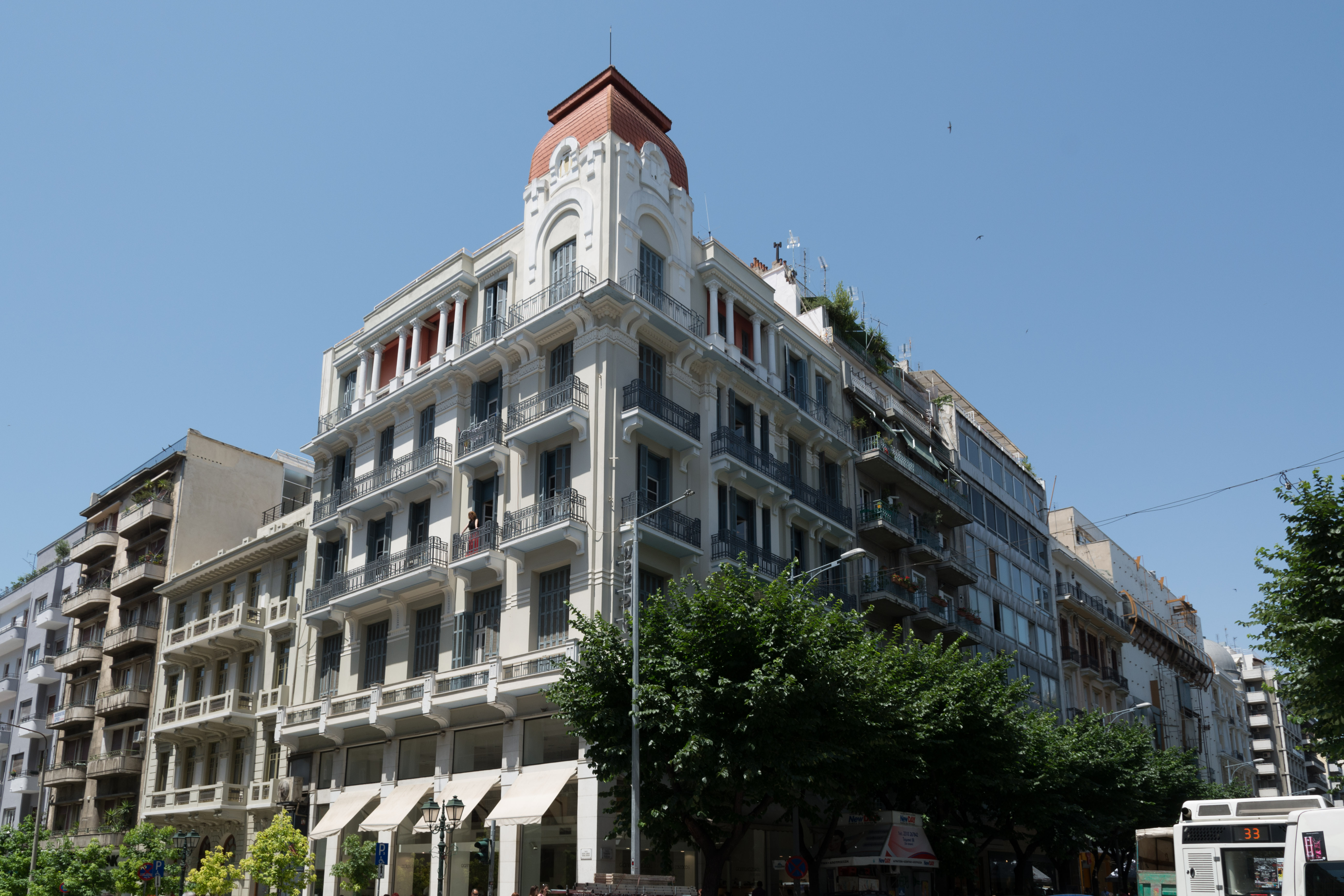 Θεσσαλονίκη 2014